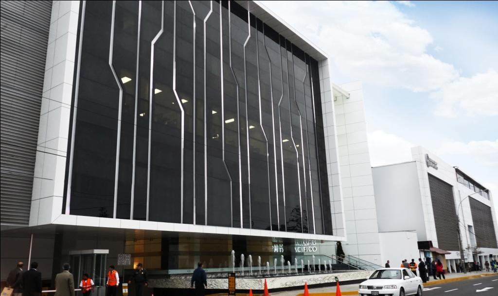 Fachada de la Universidad del Pacífico